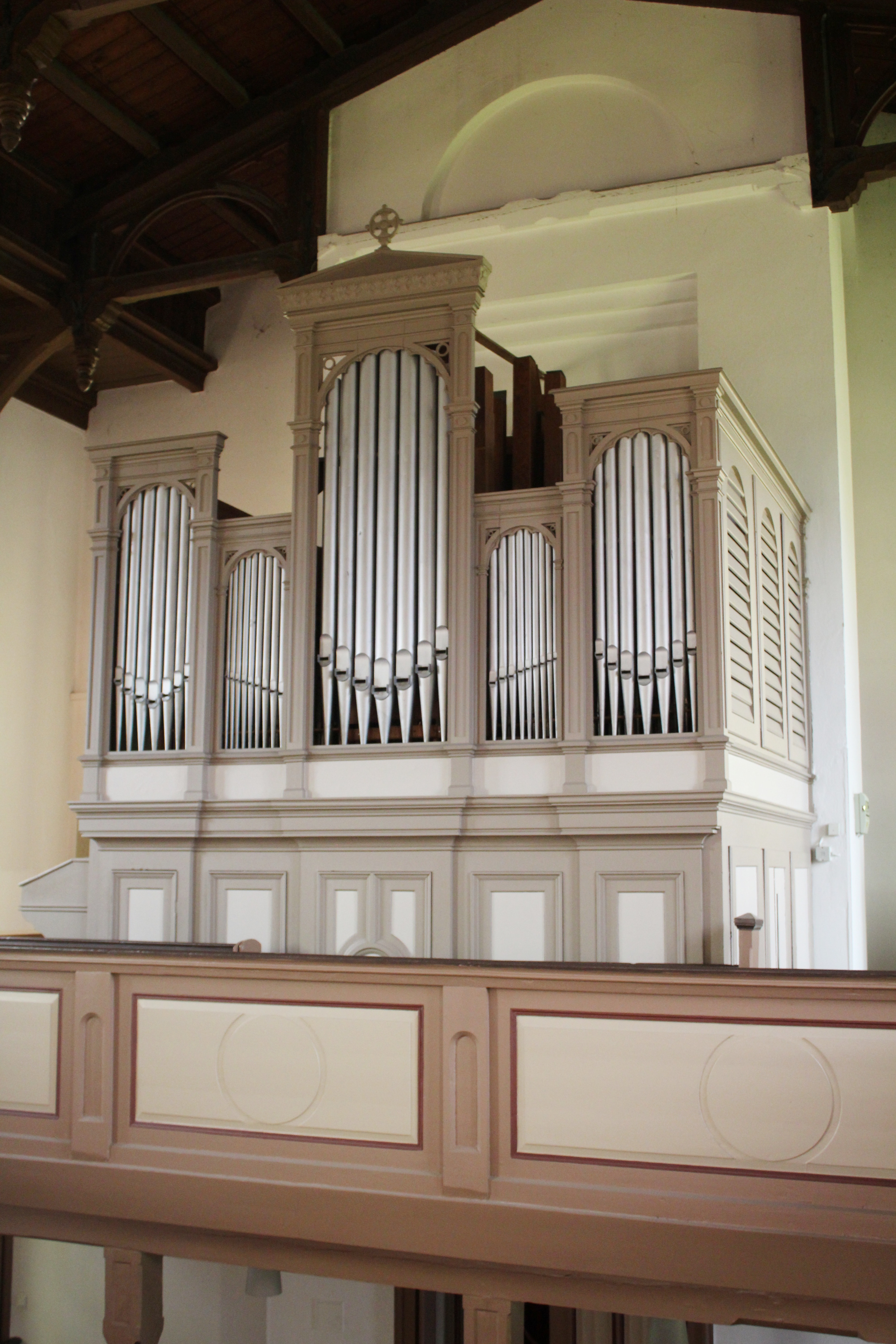 Ev. Kirche Garbenheim, Wetzlar, Lahn-Dill-Kreis, Hessen, Deutschland